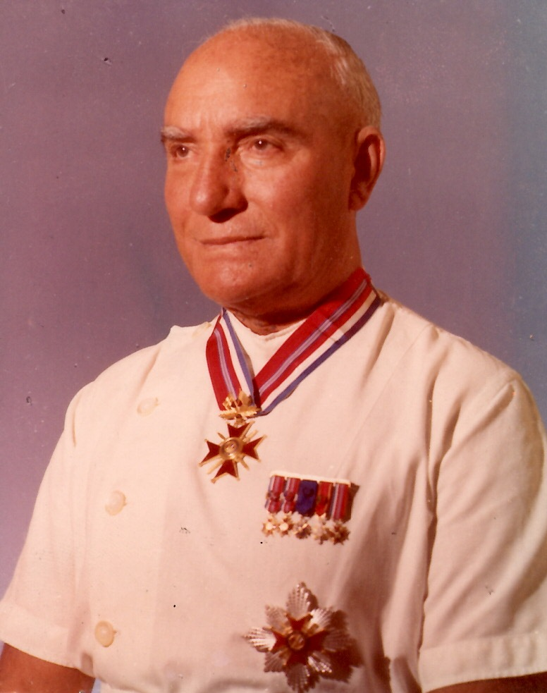 Dr. Κωνσταντίνος Τράγκας, Ιατρός. Ο πρώτος Βελονοθεραπευτής στην Ελλάδα. Προσωπικό αρχείο της ανιψιάς του, Χριστίνας Τράγκα.